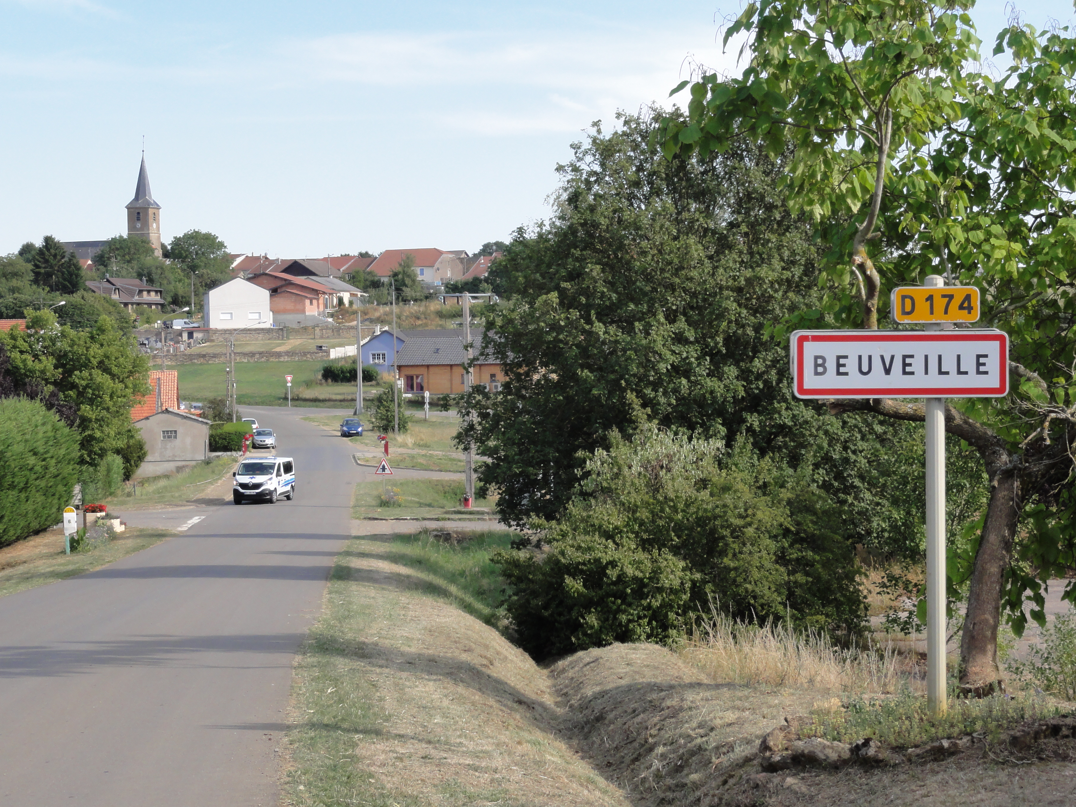 Beuveille (Meurthe-et-M.) city limit sign